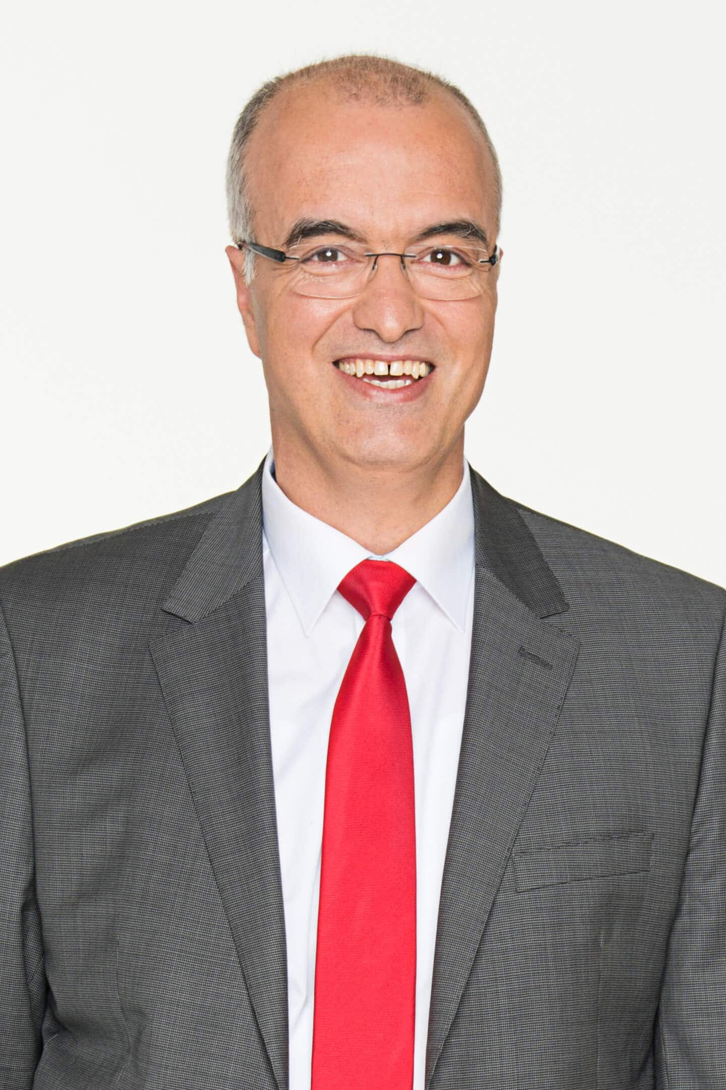 Ramazan Selcuk SPD Landtagsabgeordneter BW